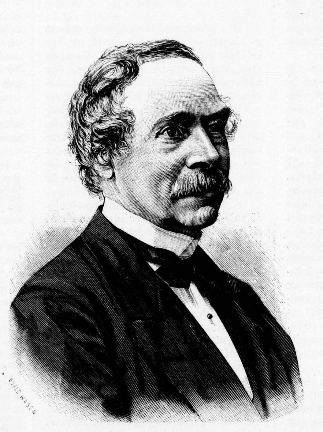 Johan Peter Cronhamn (1803-1875)